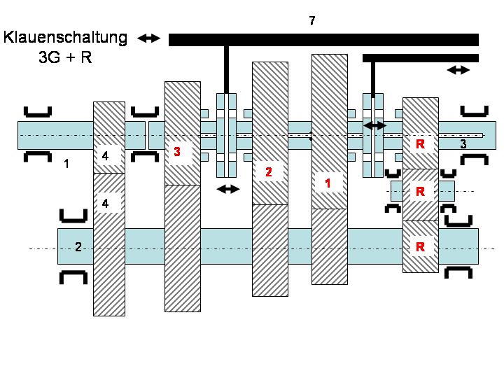 Skizze 3 einer Klauenschaltung